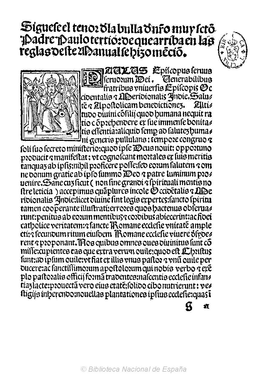 Manual de adultos [Texto impreso]. - Imprimiose ... en ... Mexico : en casa d[e] Ju¯a Cromberger, 1540, a xiij dias d[e]l mes d[e] Deziembre. - [2] h. ; 4º. Signatura R/29333